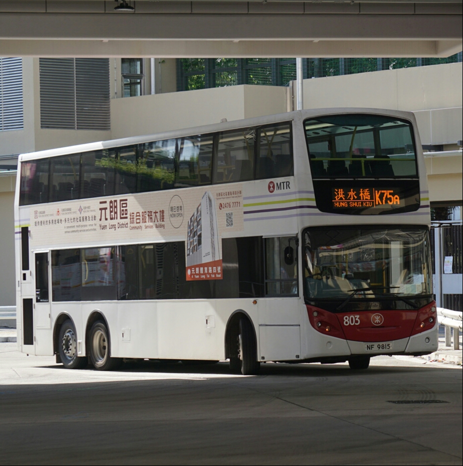 中文（香港）: 正駛入天水圍站的港鐵巴士K75A線